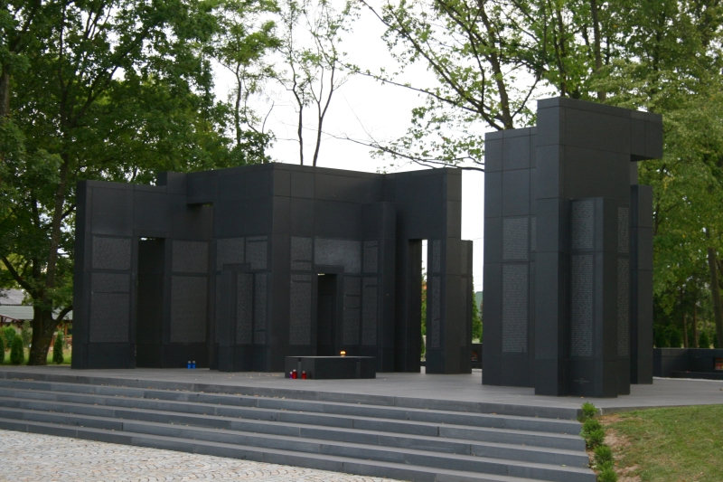 Memorijal žrtvama, nestalim i zatočenim hrvatskim braniteljima, rad Dušana Džamonje na zagrebačkom Mirogoju